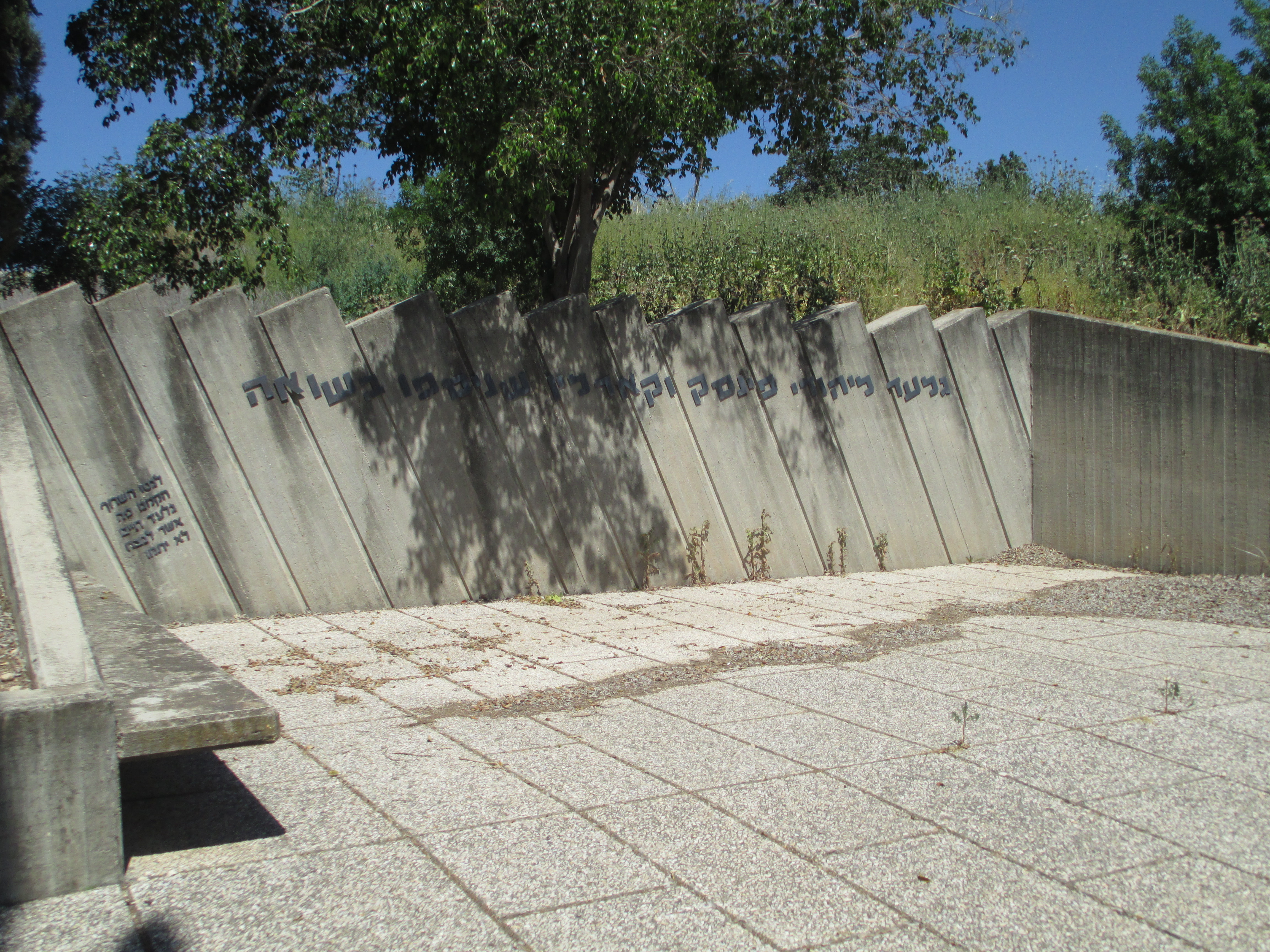 אנדרטת זיכרון בקיבוץ גבת ליהודי פינסק שנספו בשואה